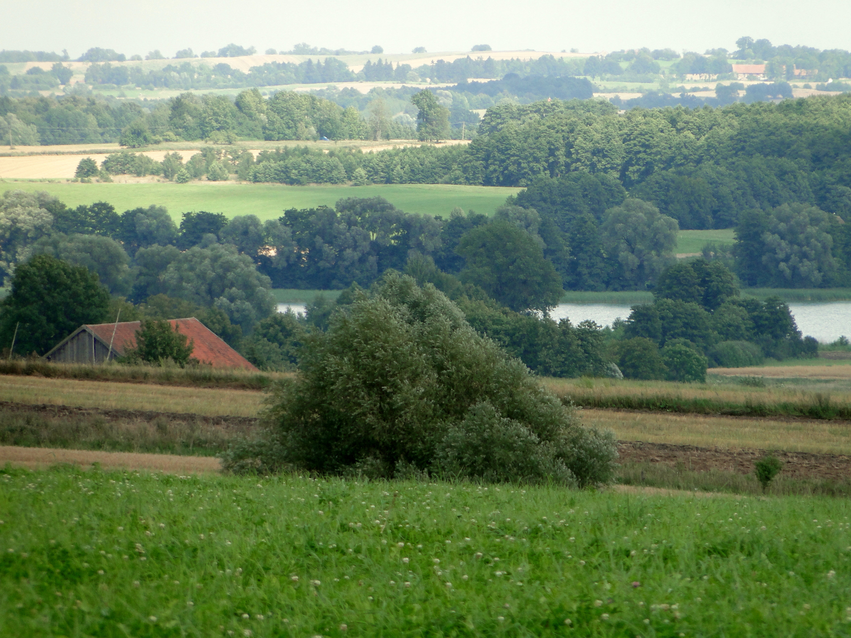 Mazurski krajobraz w okolicach Srokowa.